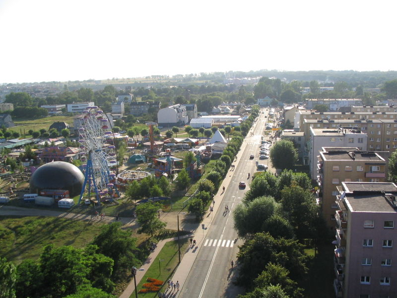 Władysławowo